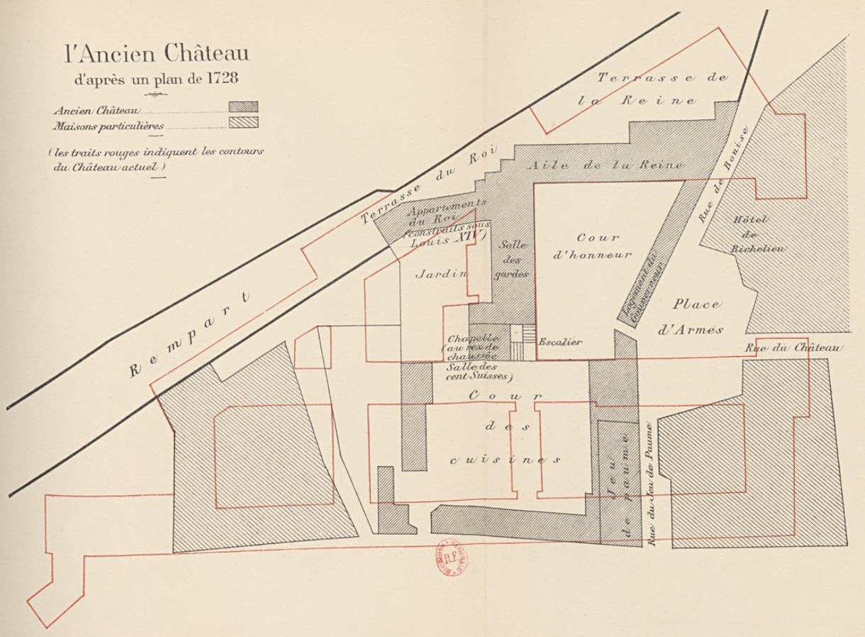 Grundriss des Schlosses Compiègne im Jahr 1728; rot eingezeichnet die Umrisse der heutigen Schlossanlage